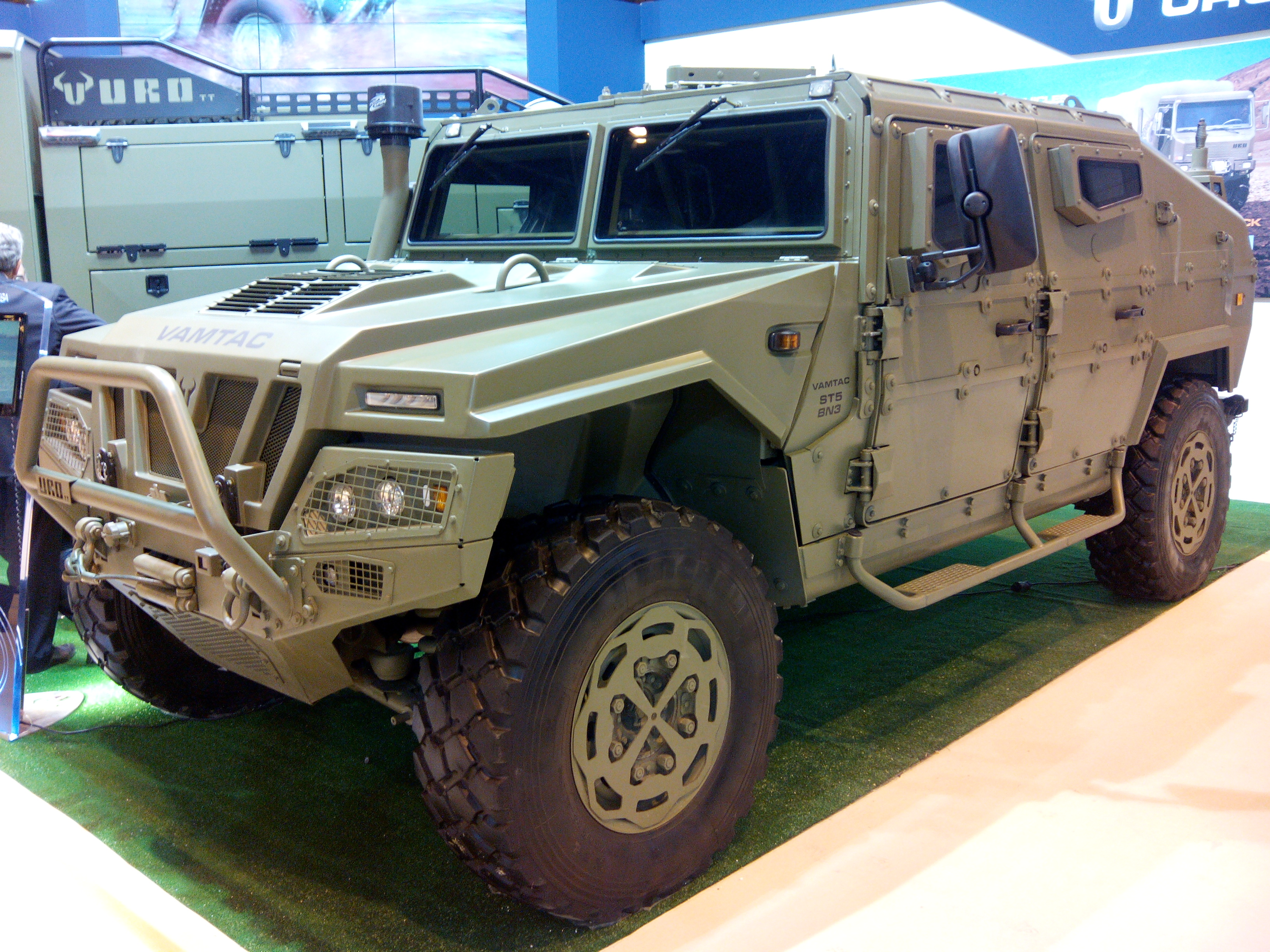 URO VAMTAC ST5 BN3 expuesto en el Salón Internacional de Tecnologías de Seguridad Nacional Homsec 2015. Desarrollado y producido por URO VAMTAC, gama militar.